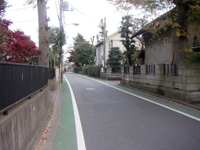 東京都府中市の人見街道。若松防災センター近く。